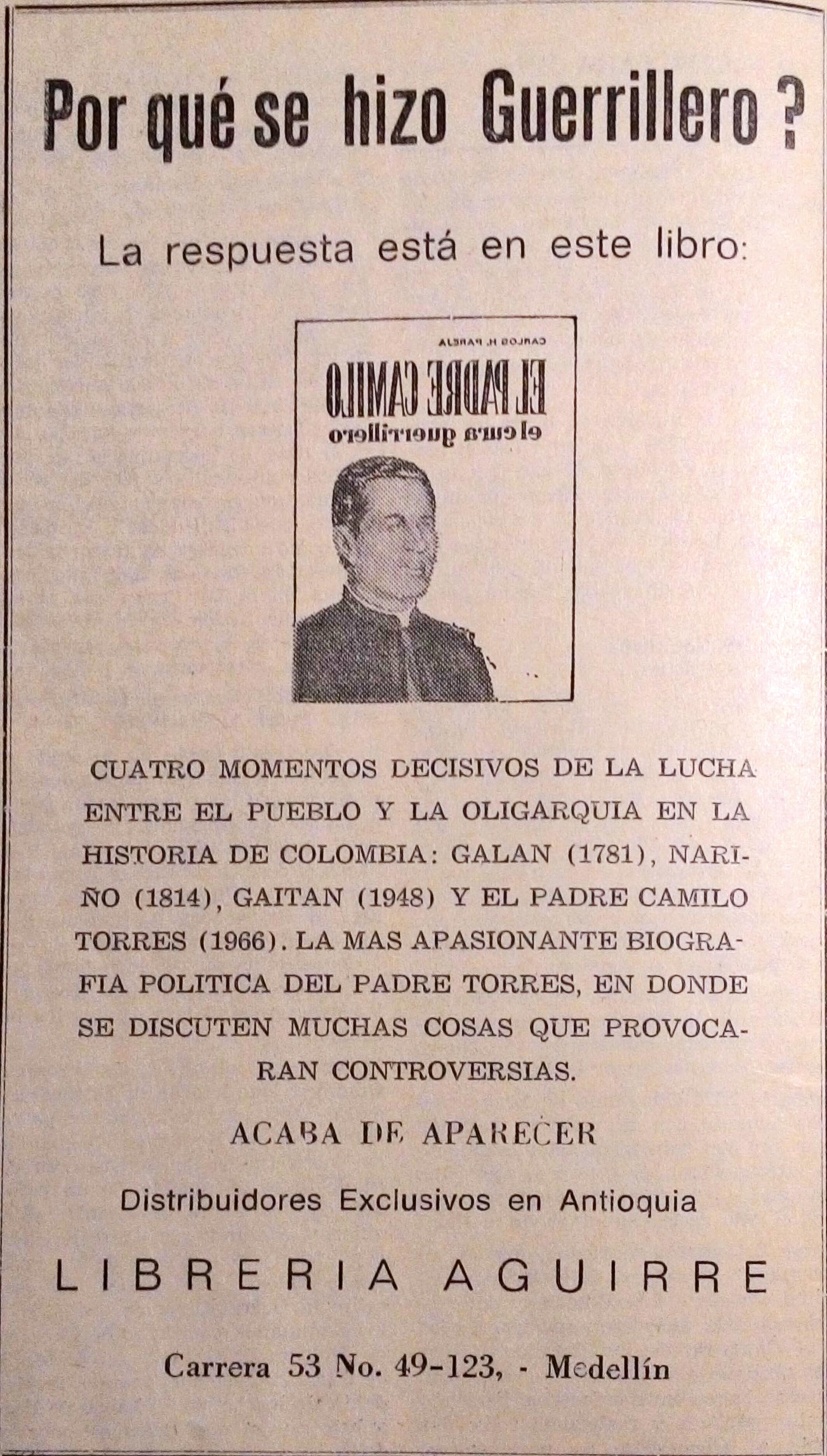 Publicidad en la revista Esquina. Se menciona el libro El padre Camilo, el cura guerrillero. Nótese el error de impresión, con la carátula del libro mencionado al revés.